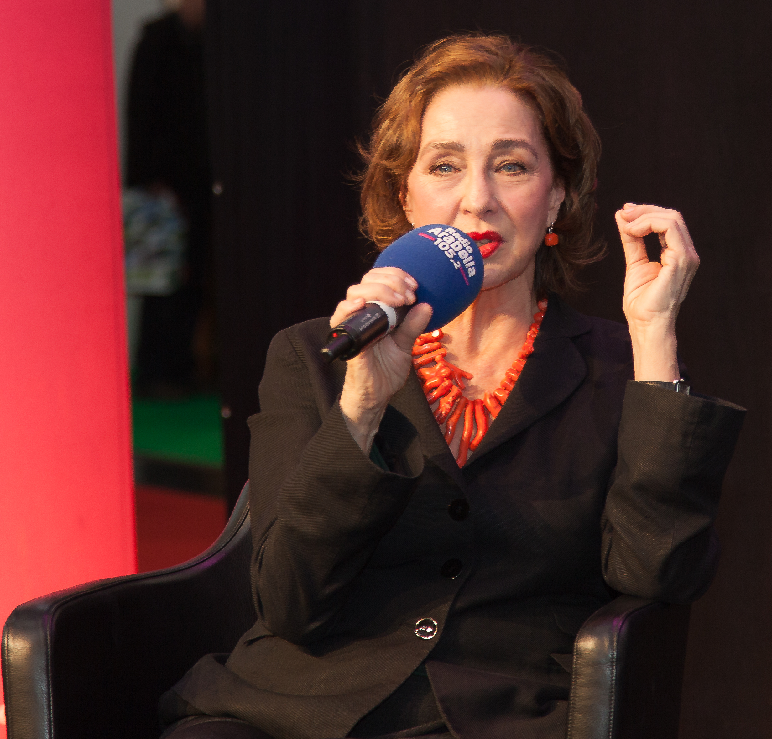 Christine Kaufmann, Schauspielerin